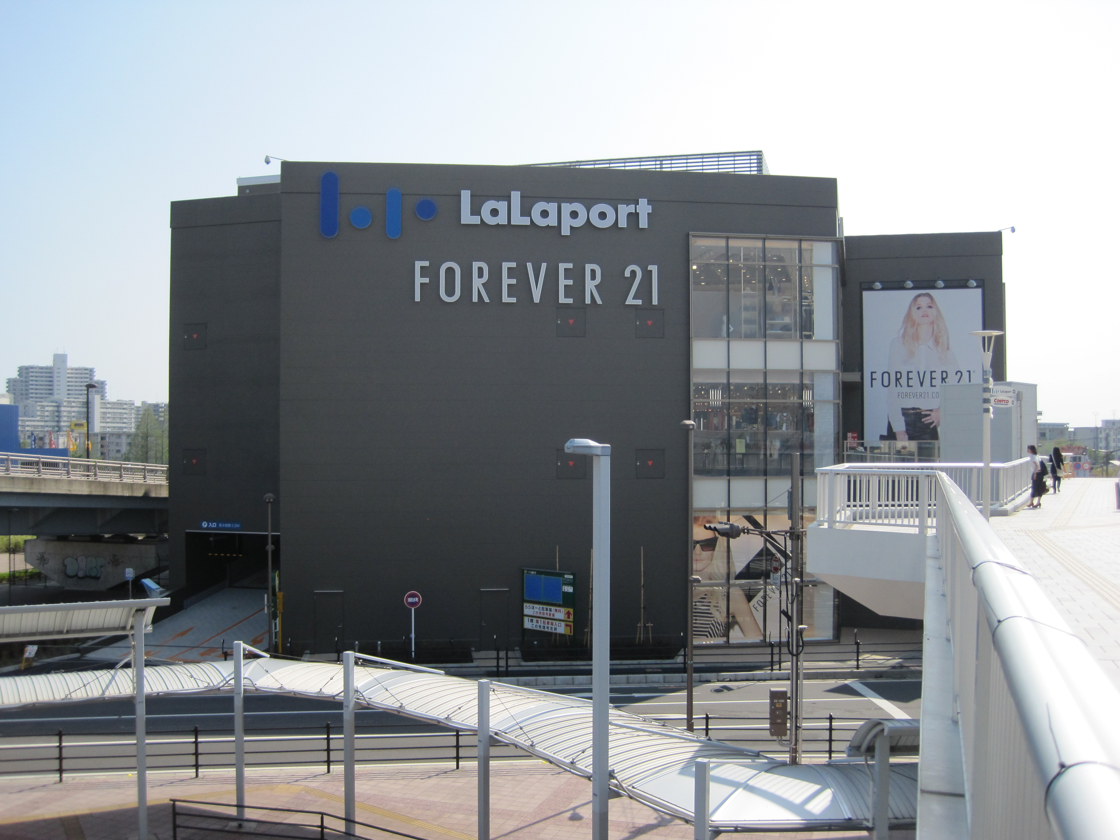 ららぽーと新三郷ANNEX